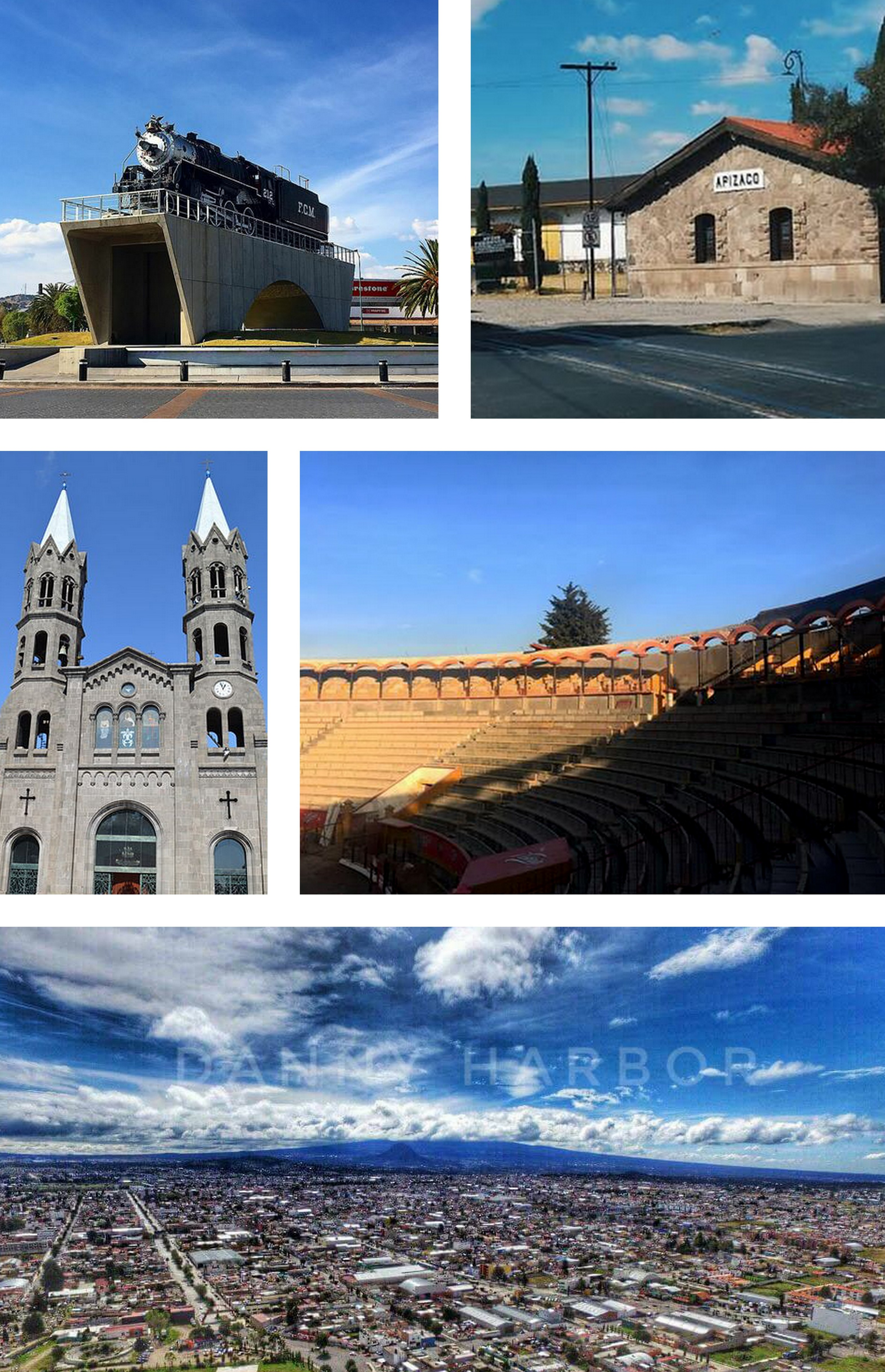 Montaje creado a partir de cinco imágenes en Wikimedia Commons: File:Apizaco.jpg File:La maquinita .png File:Museo Casa de Piedra.jpg File:Plaza de toros el pana.png File:BasilicaApizaco03.JPG